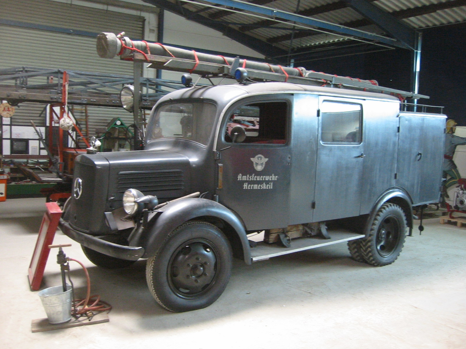 Standort: Rheinland-Pfälzisches Feuerwehrmuseum Hermeskeil. Baujahr 1943